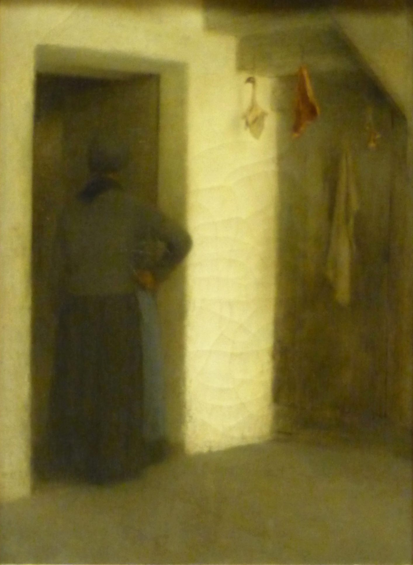 Léonard Jarraud : Le cellier (46 x 32 cm), non daté. Musée d'Angoulême, Charente (France).